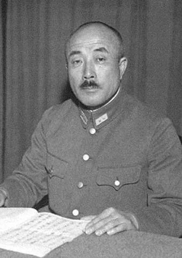 板垣征四郎 / Seishirō Itagaki (1880–1944)